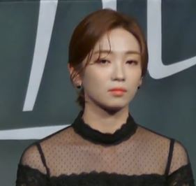 23일 오후 서울시 영등포구 타임스퀘어 아모리스홀에서 KBS W 새 수목드라마 '시간이 멈추는 그때' 제작발표회가 열렸다. 이날 김현중, 안지현, 인교진, 임하룡, 주석태 배우가 참석해 각자 맡은 배역에 대해 설명을 하고 있다.